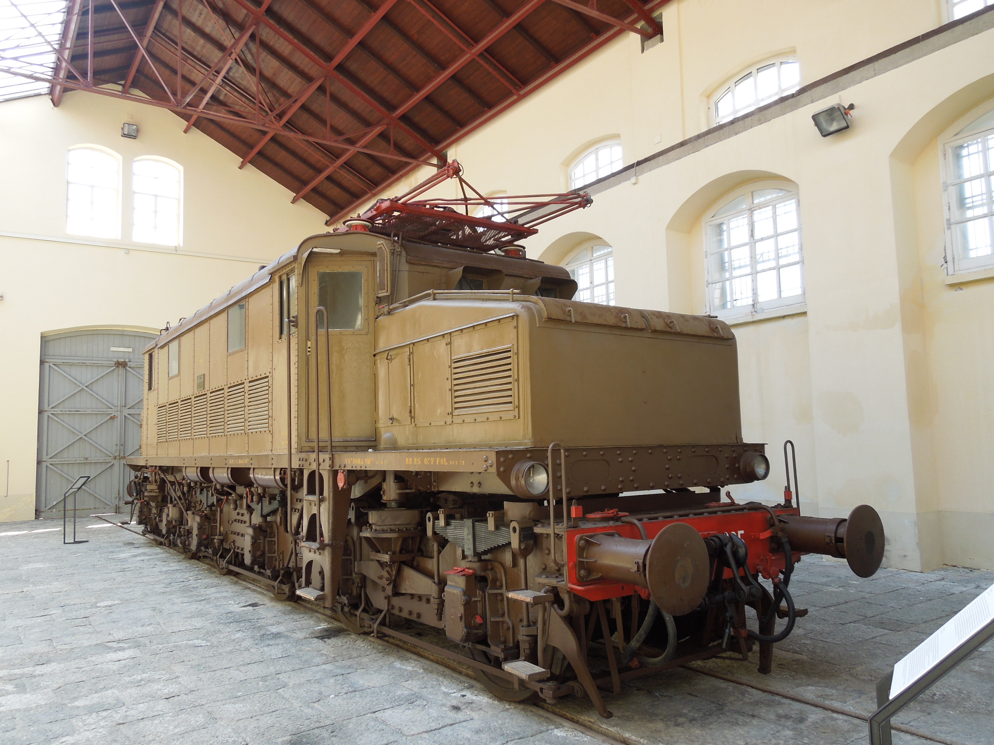 A Pietrarsa vasúttörténeti múzeum